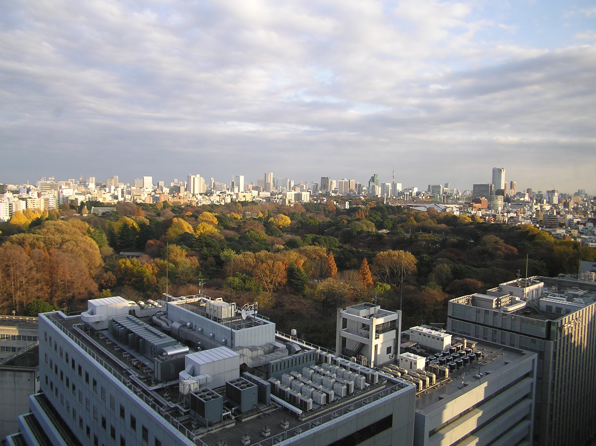 Shinjuku-Gyoen Park